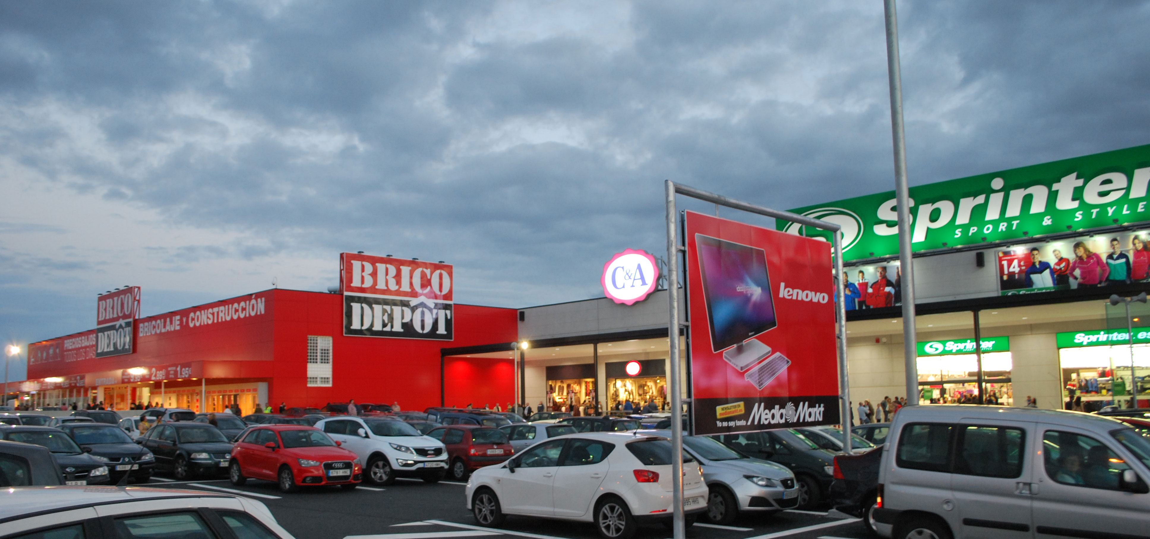 Centro Comercial Parque Ferrol O Boial Santa Icía A Coruña Galiza